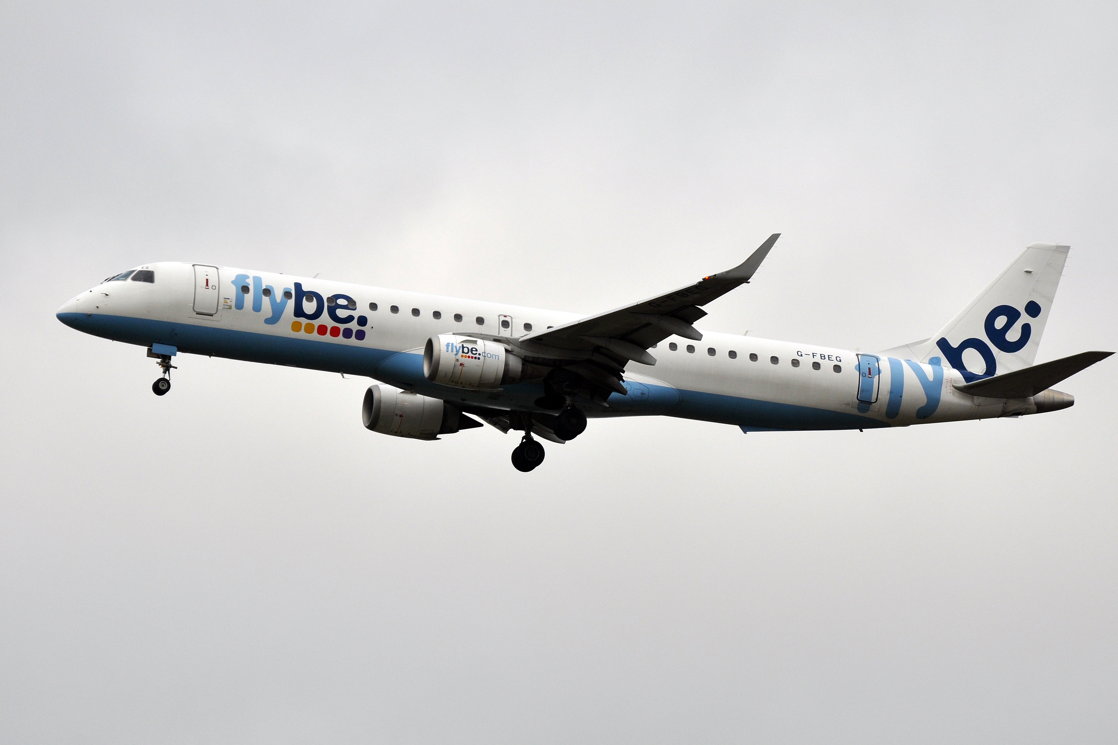 MSN 120 EMB 195SR FLYBE CDG